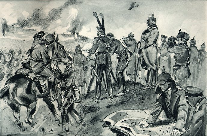 Hindenburg während der Schlacht